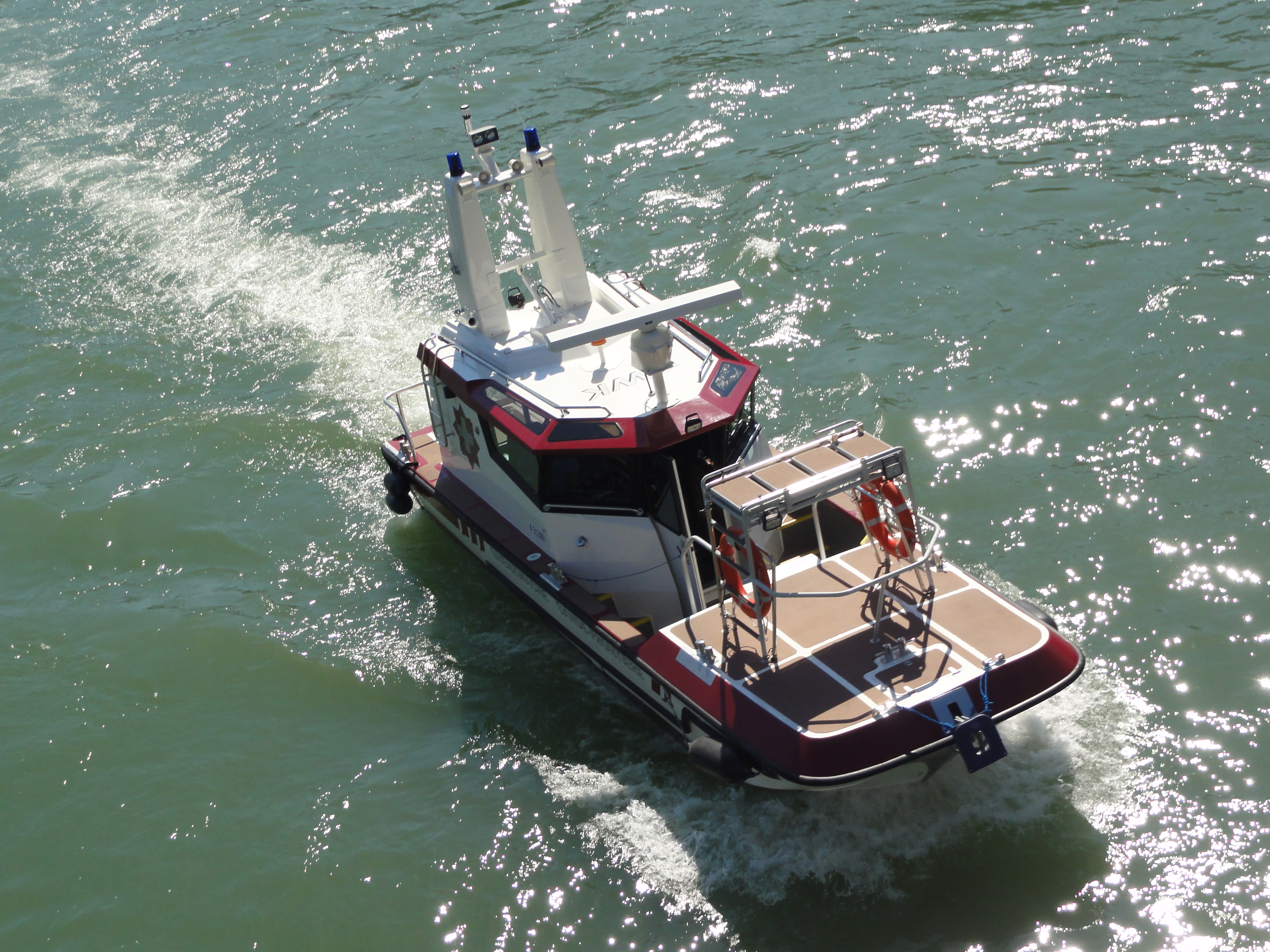 Basel Stadt — Boot des Grenzwachtkorps (Aufschrift „Grenzwacht“) EXIF data with GPS coordinates and magnetic direction. GPS data may be inaccurate.